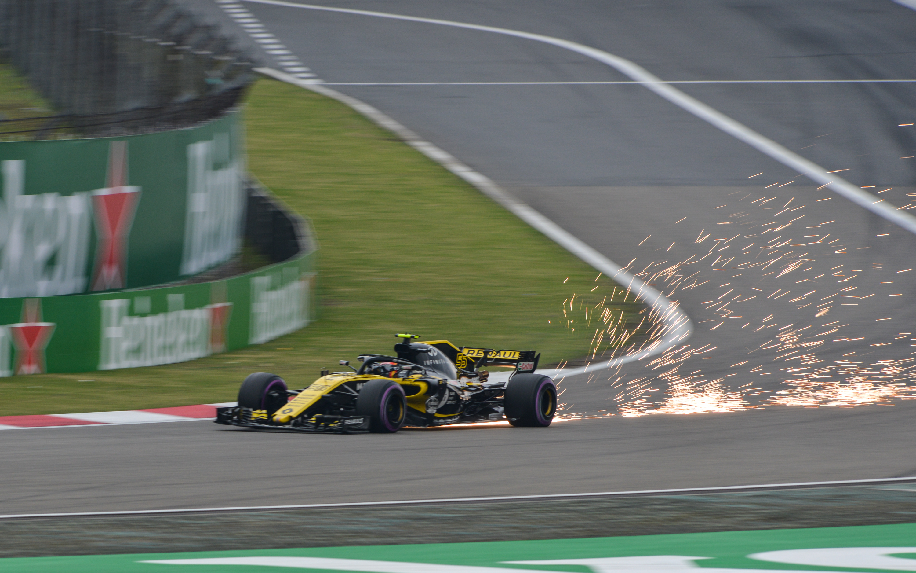 Renault